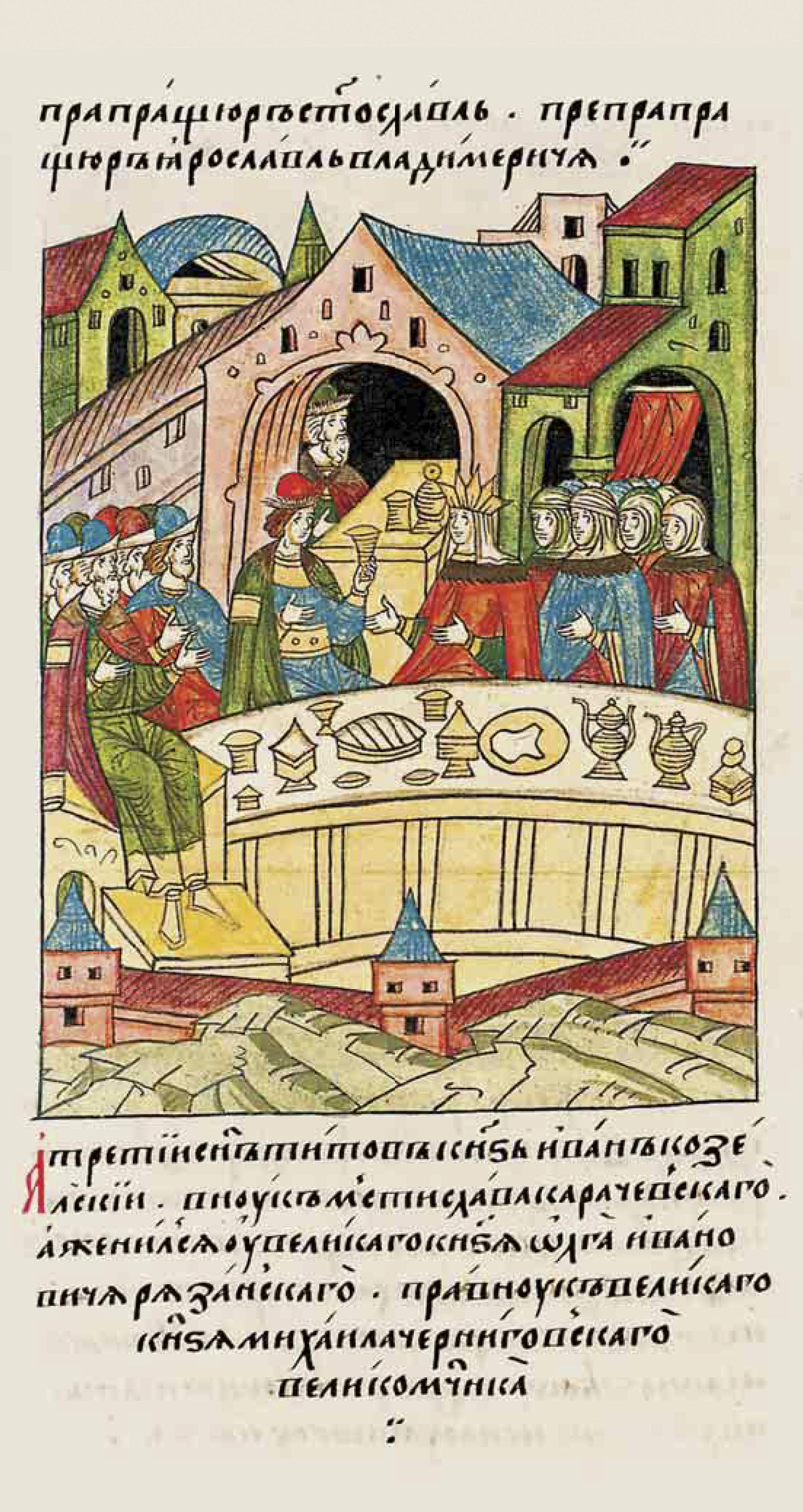 ЛИЦЕВОЙ ЛЕТОПИСНЫЙ СВОД А третий сын Тита князь Иван Козельский, внук Мстислава Корачевского, женился на дочери великого князя Олега Ивановича Рязанского, правнука великомученика великого князя Михаила Черниговского.